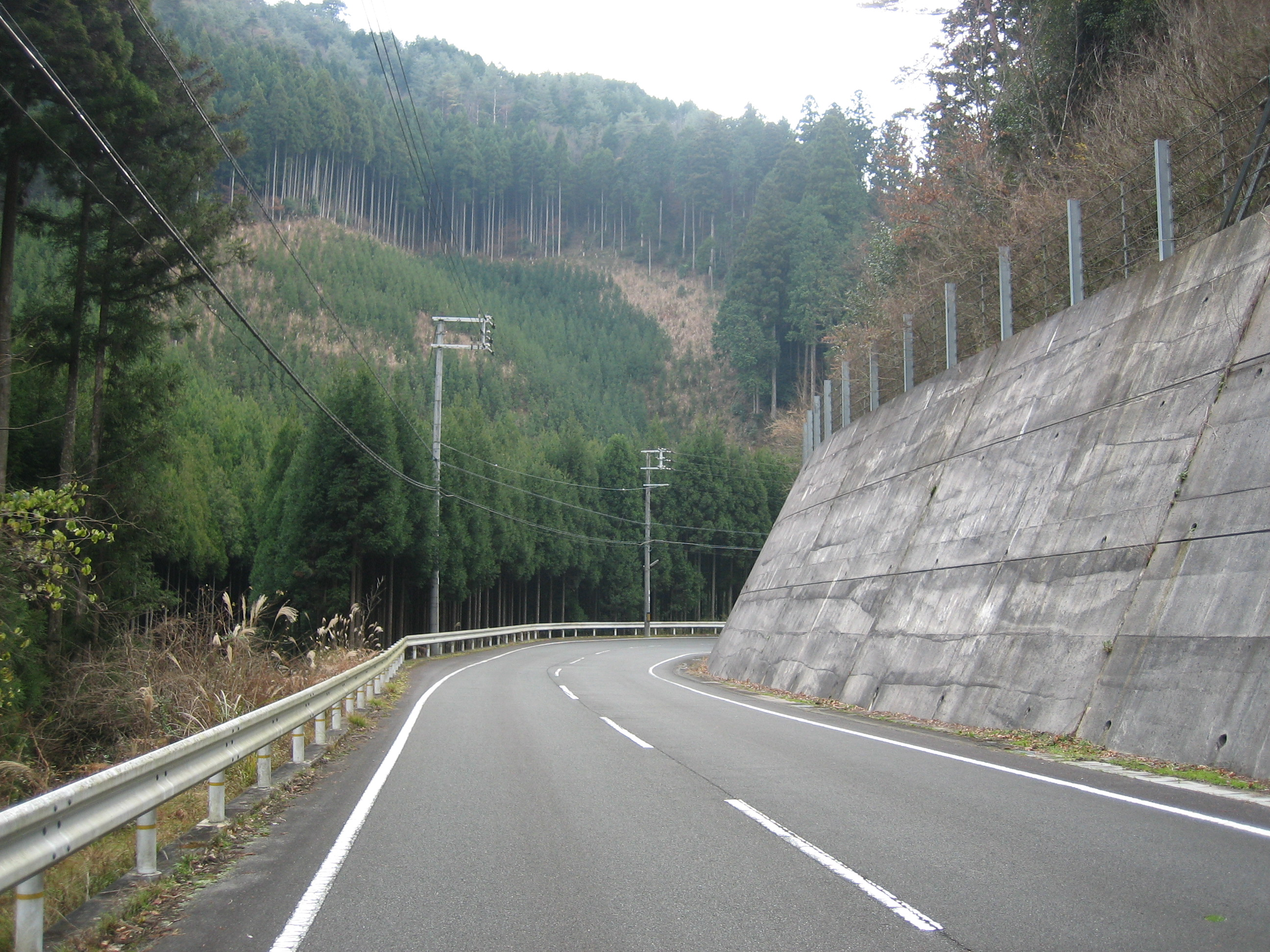 京都府道107号雲ヶ畑下杉坂線を京都市北区真弓八幡町から撮影